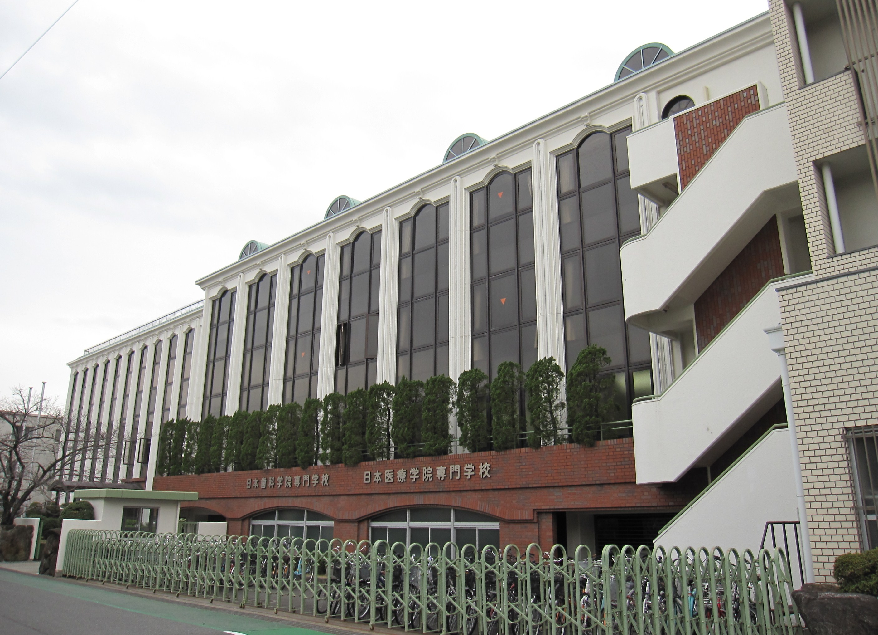 日本医療学院専門学校・日本歯科学院専門学校